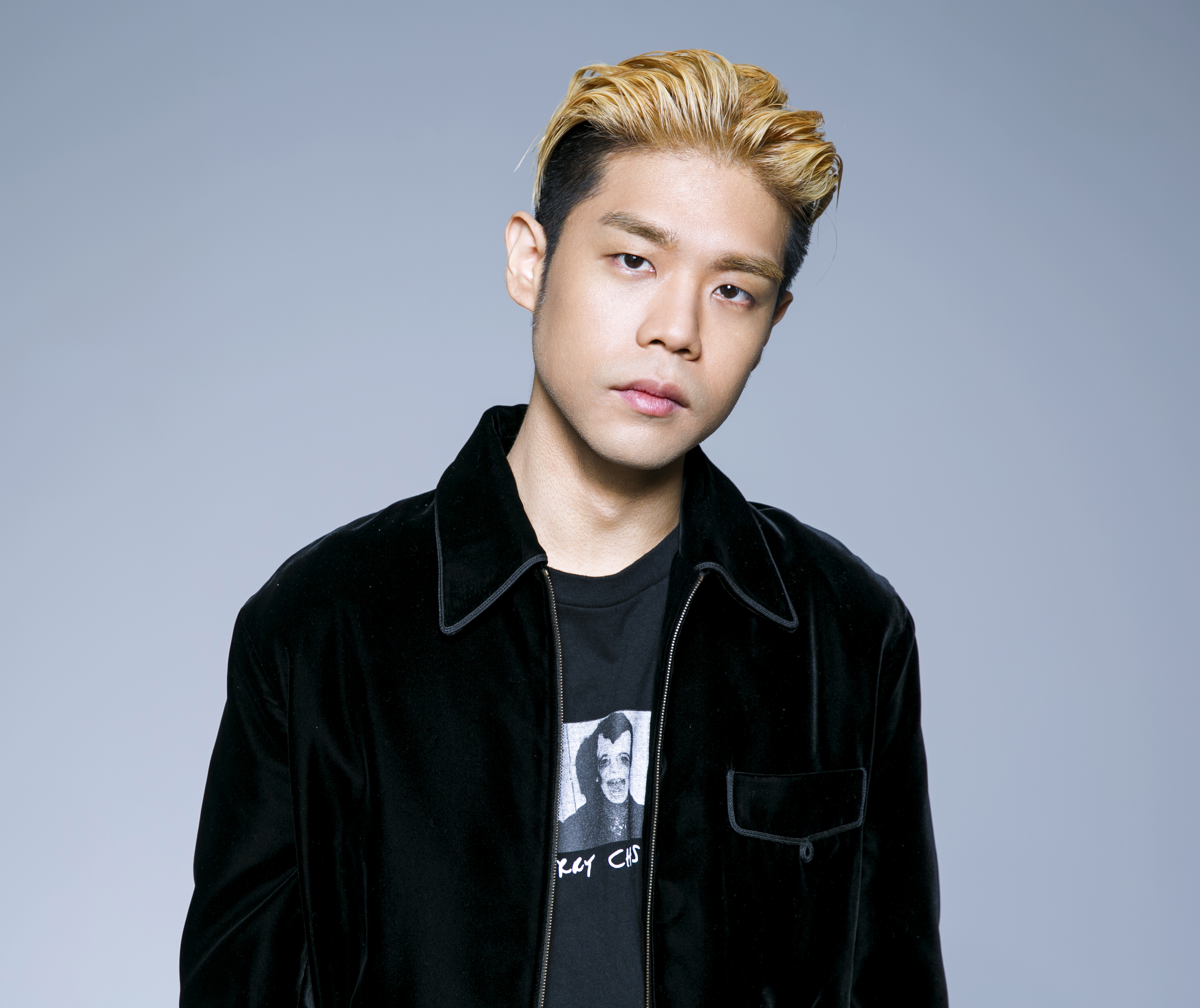 2017 한요한